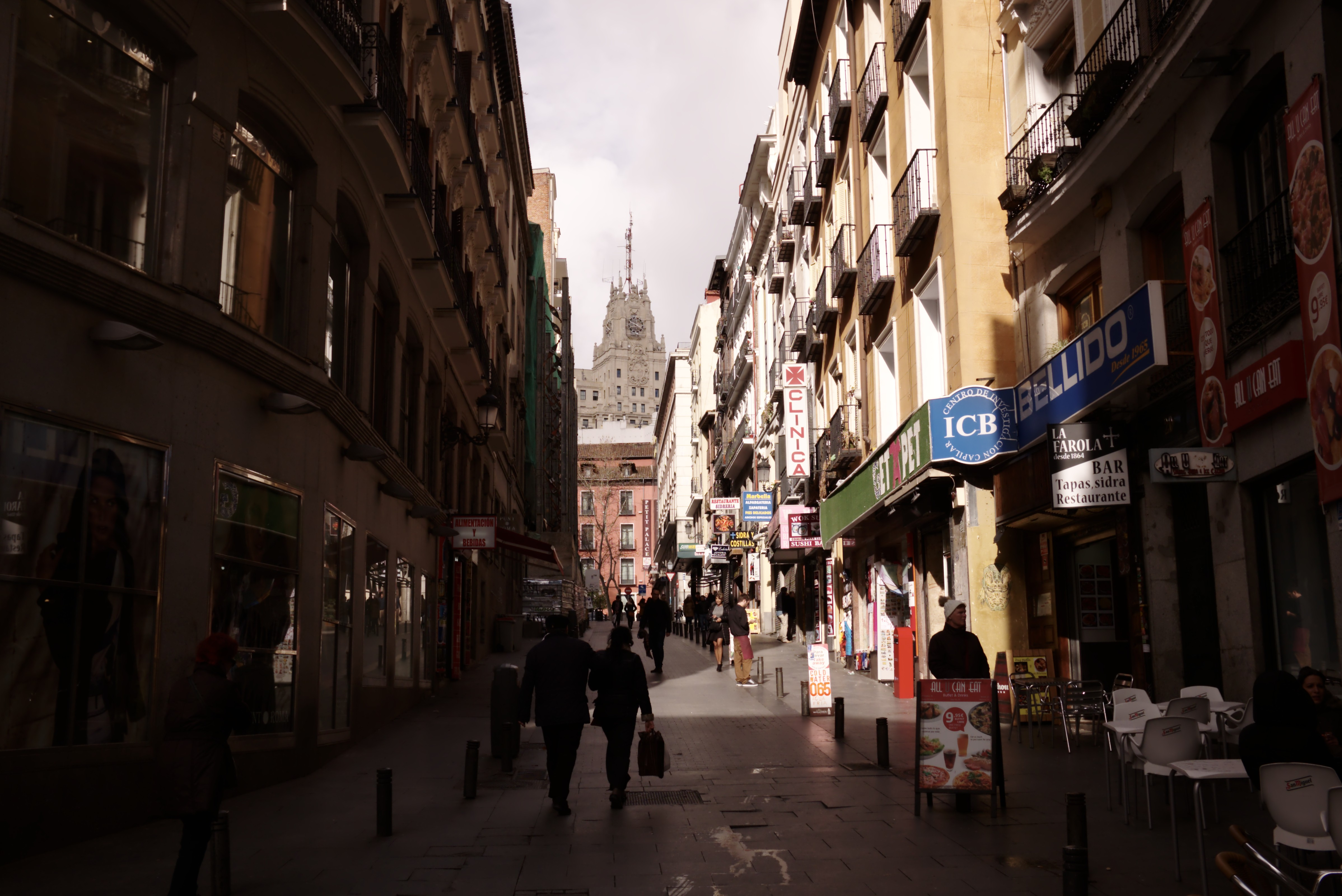 Madrid